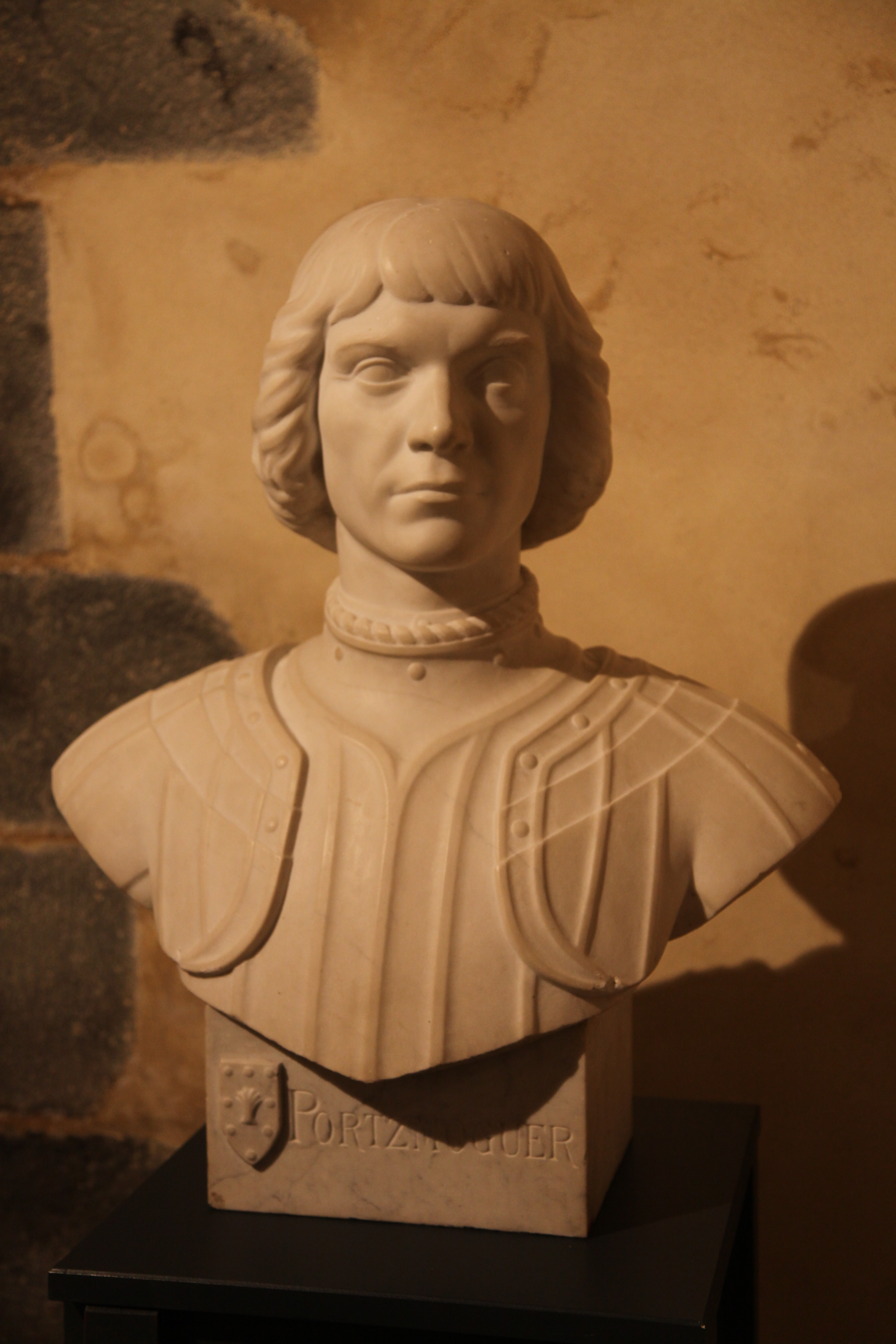 Hervé de Portzmoguer. Château de Brest